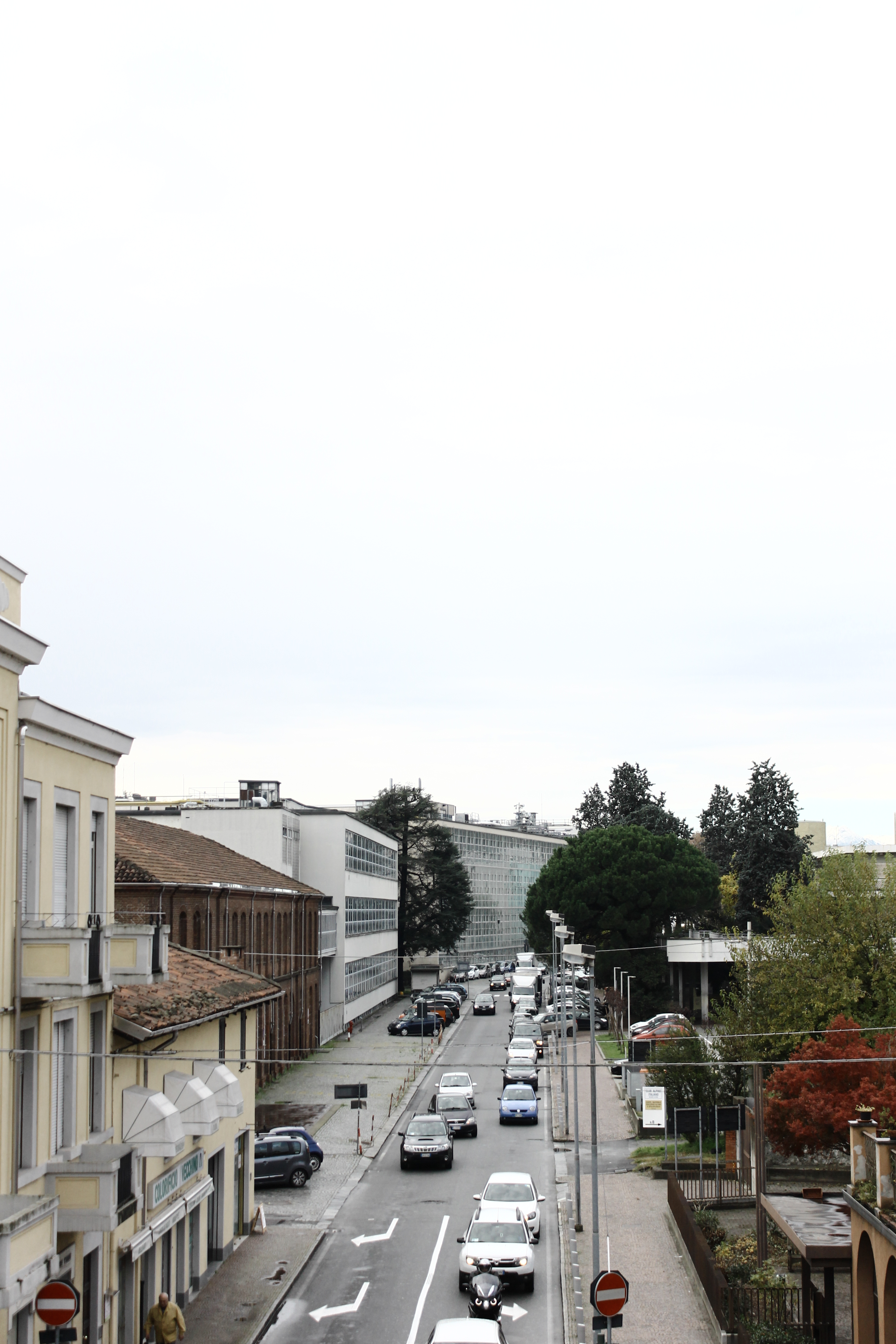 Veduta di Corso Jervis